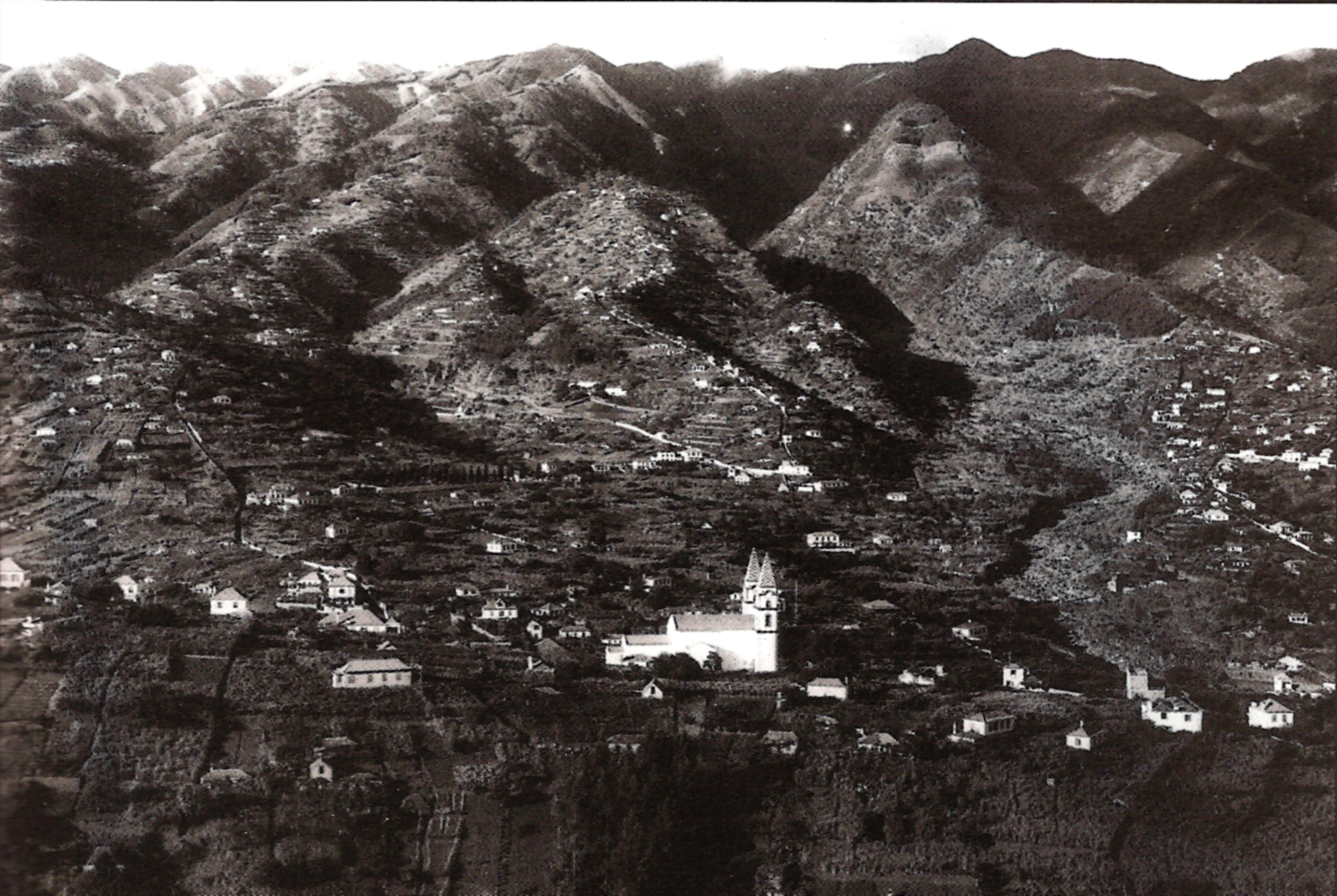 Igreja de Santo António vista do Miradouro do Pico dos Barcelos